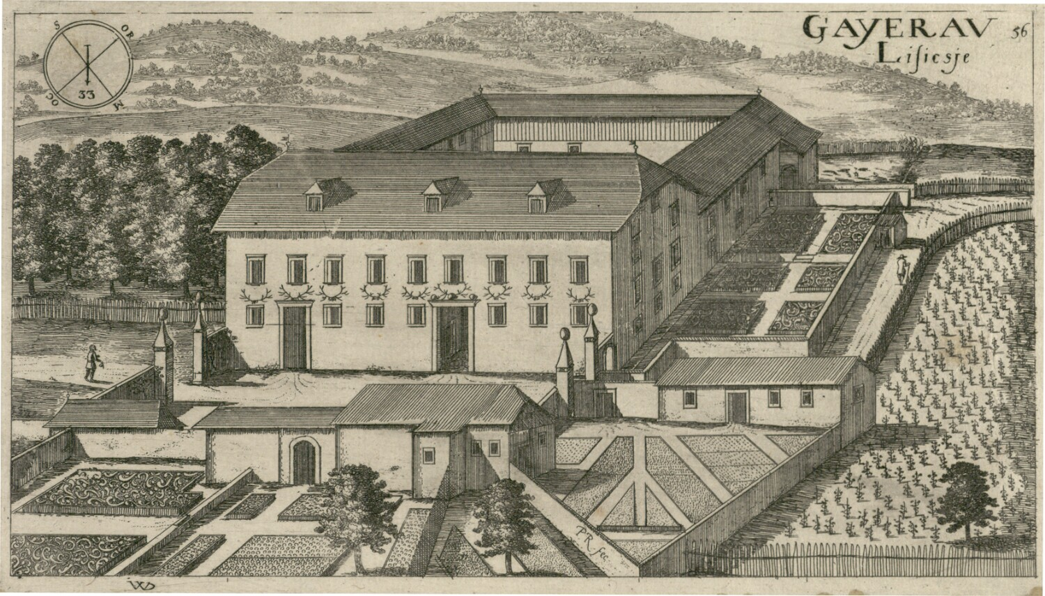 Dvorec Lisičje (Gayerau)